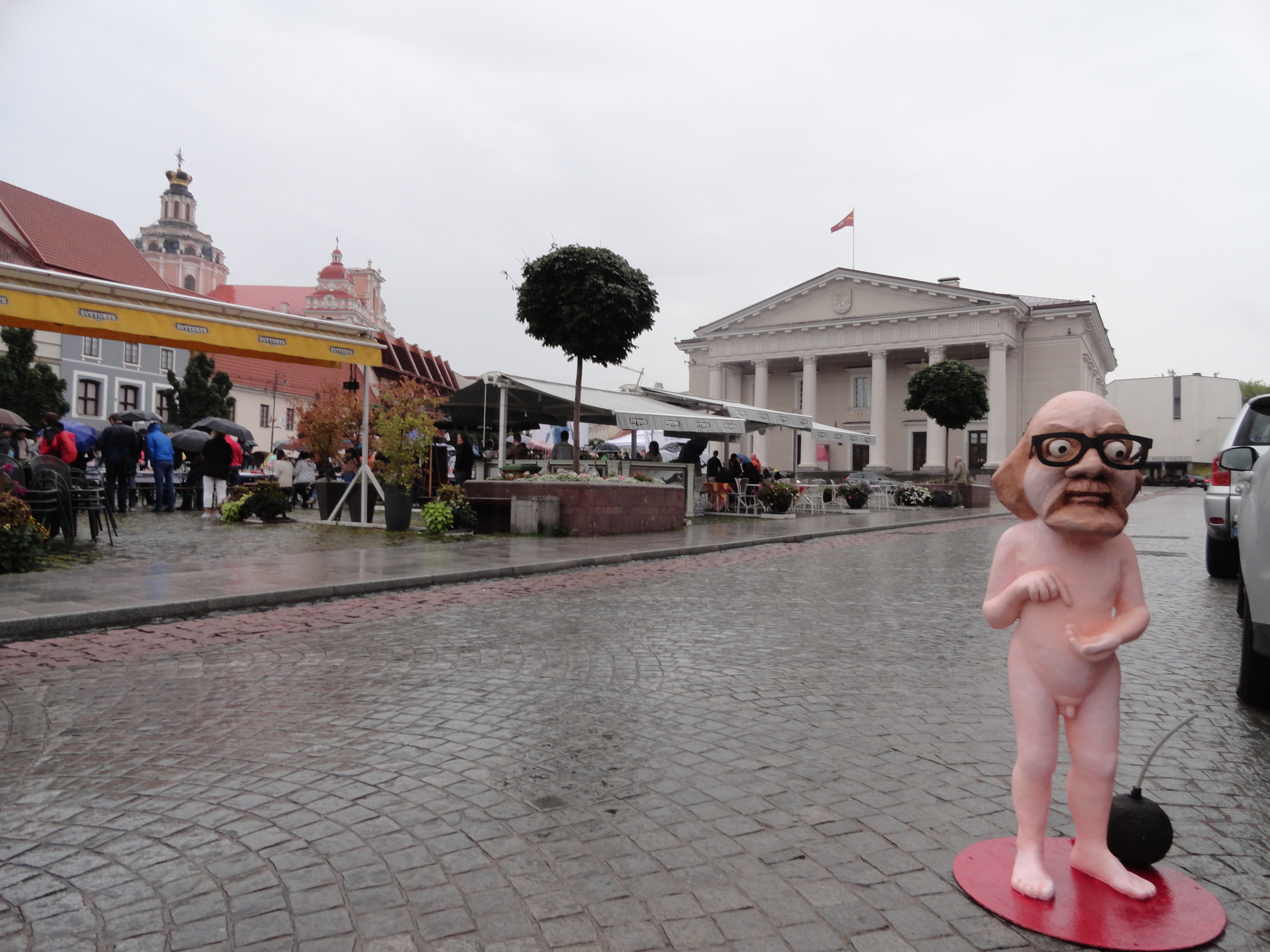 Włapko w Wilnie